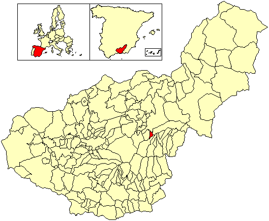 Situación del término municipal de Albuñán respecto a la provincia de Granada, en España.